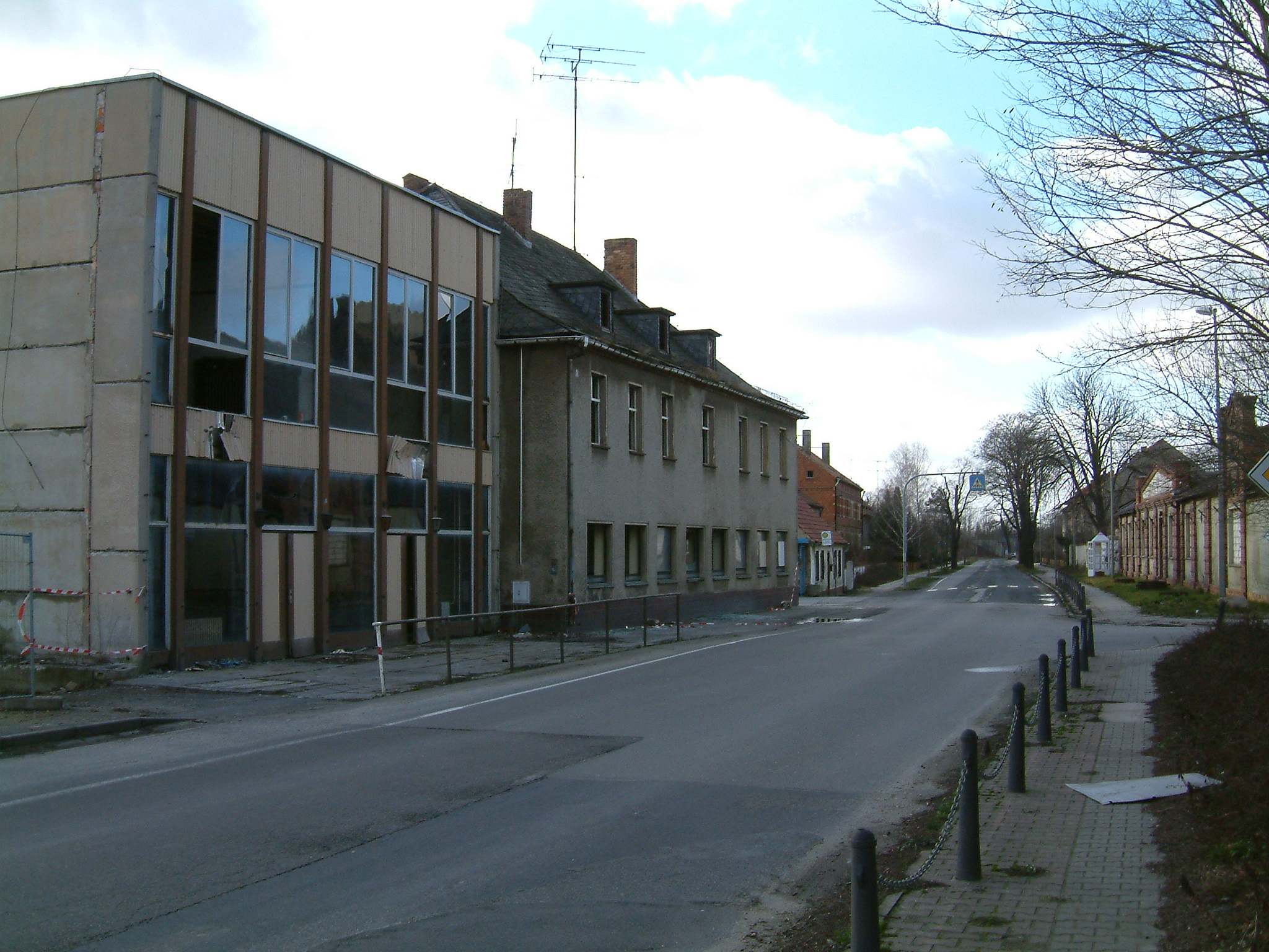 Hauptstraße durch (Alt)-Haidemühl im Landkreis Spree-Neiße im Land Brandenburg